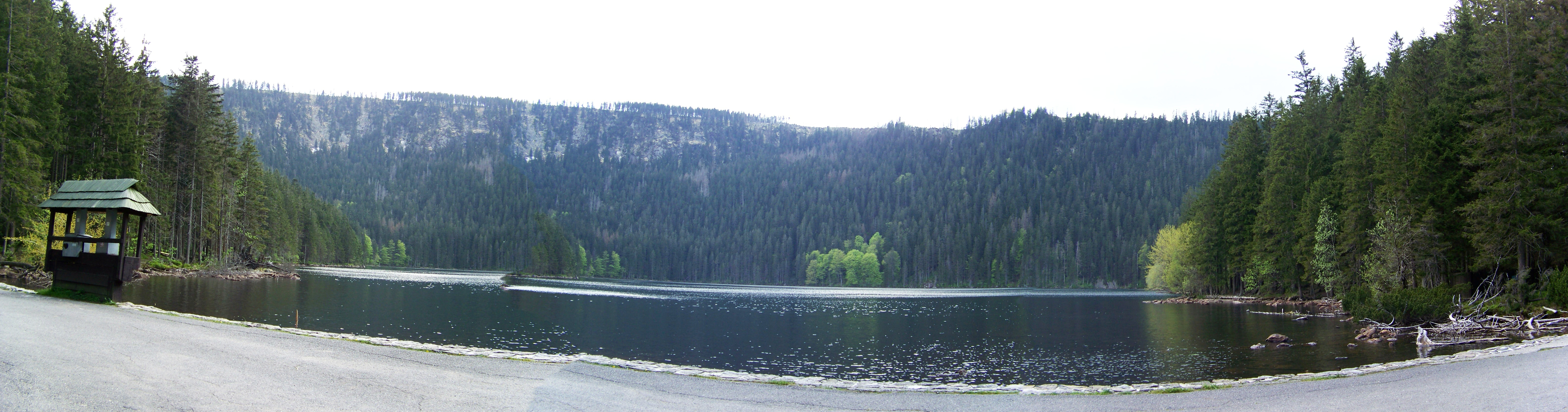 Záběr Černého jezera z jeho hráze proti karové jezerní stěně